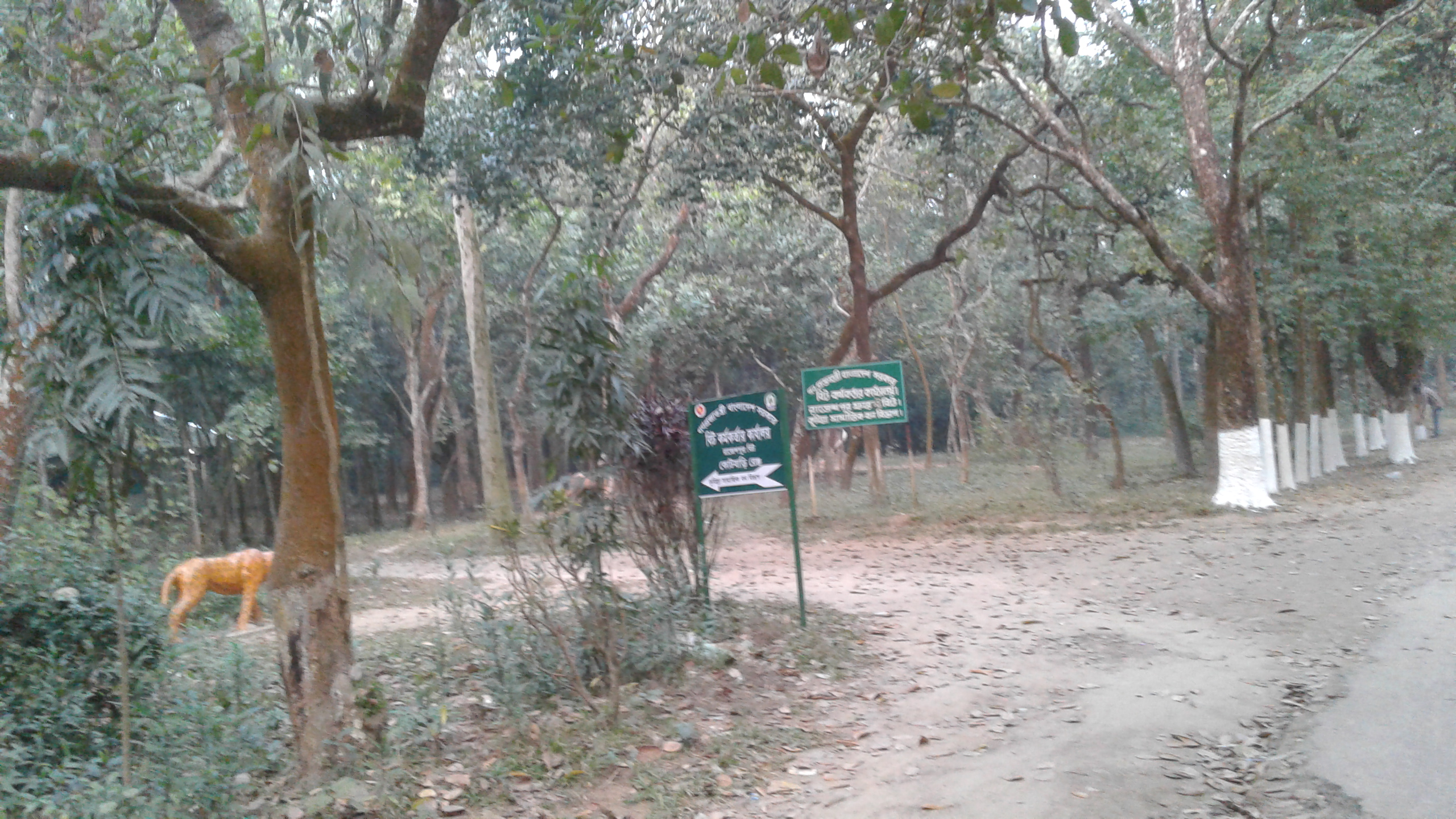 কুমিল্লা জেলার সদর দক্ষিণ উপজেলার জোড়কানন ইউনিয়নে অবস্থিত রাজেশপুর ইর্কো পার্ক।